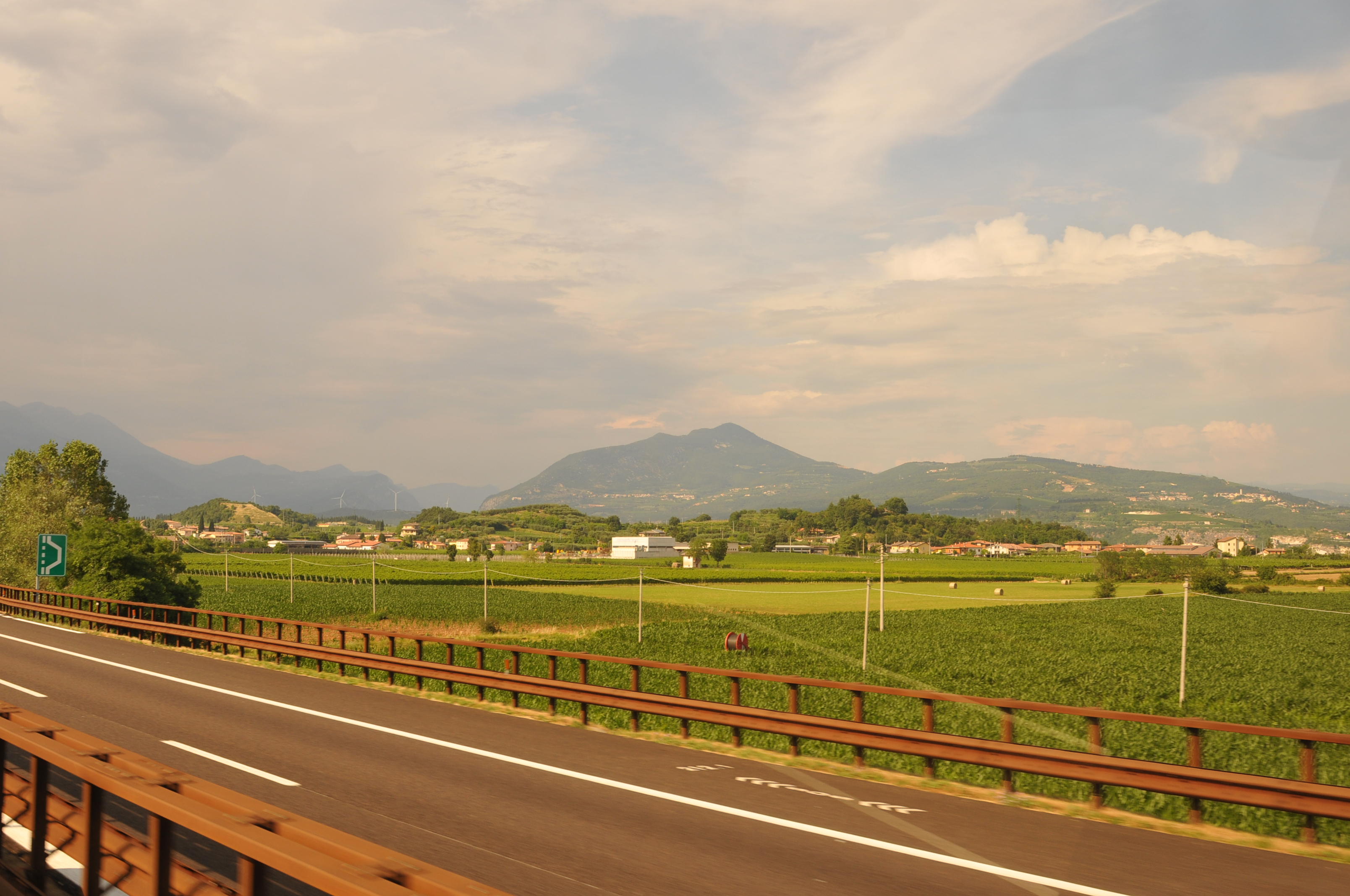 奥地利因斯布鲁克去，意大利威尼斯的路上，Innsbruck, Austria to Venice, Italy, on the road, Cina Xinjiang, Urumqi il benvenuto alla visita della città